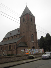 kerk van Heurne (Oudenaarde)